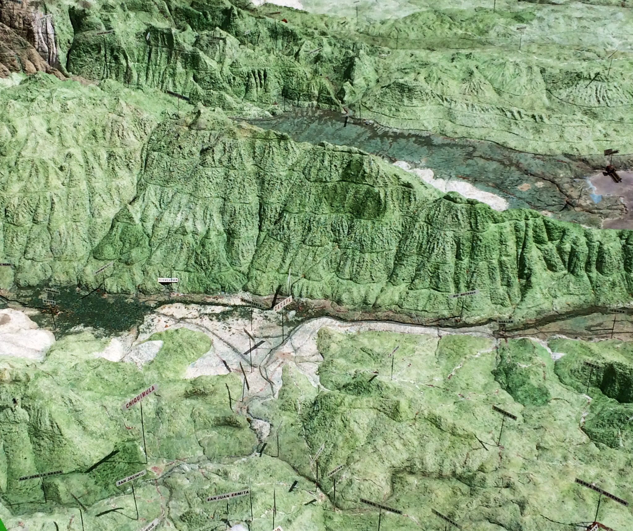 Sierraminasrelieve